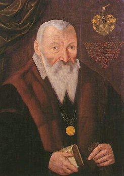 Nikolaus Varnbueler (Replik eines Bildnisses von Hans Urlich Alt; Öl auf Holz)